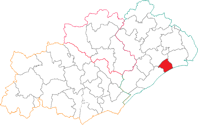 Situation du canton dans le département de l'Hérault.